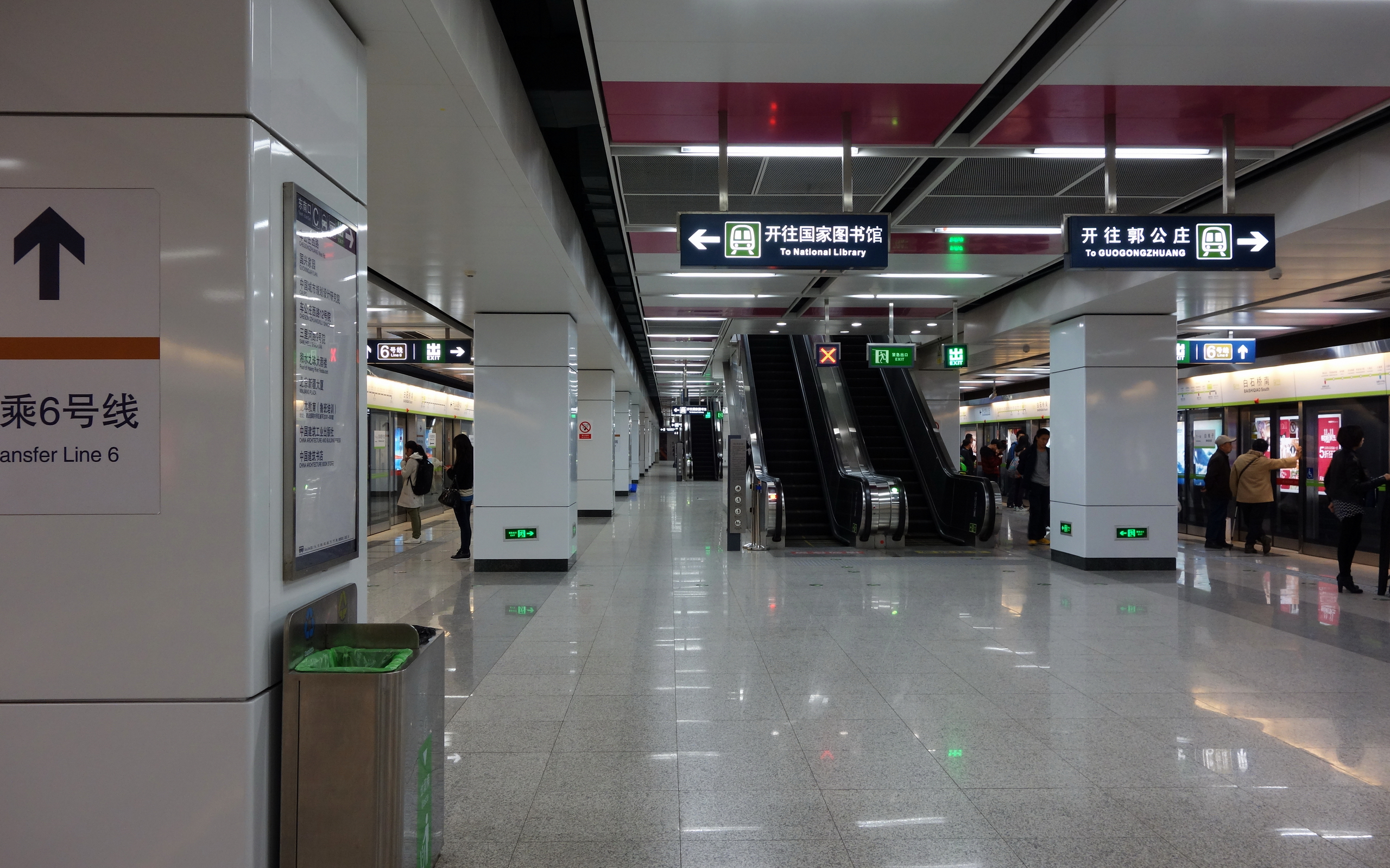 白石桥南站9号线站台